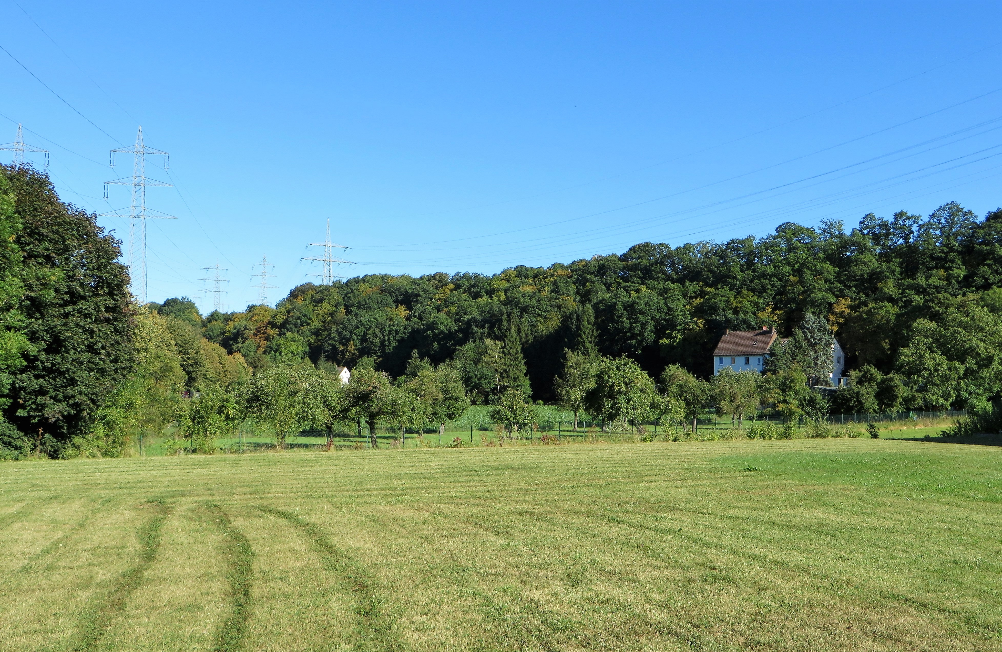 Geschützter Landschaftsbestandteil 1.4.2.26 „Lennesteilhang Berchum“ in Hagen. Das Gebiet erstreckt sich nordöstlich der Verbands- und Wannebachstraße (auf dem Foto im Hintergrund) bei Berchum. Es handelt sich um einen überwiegend bewaldeten Steilhang (ehemaliger Lenne-Prallhang) mit kühl-feuchten Felspartien und artenreichen Laubwaldbeständen.